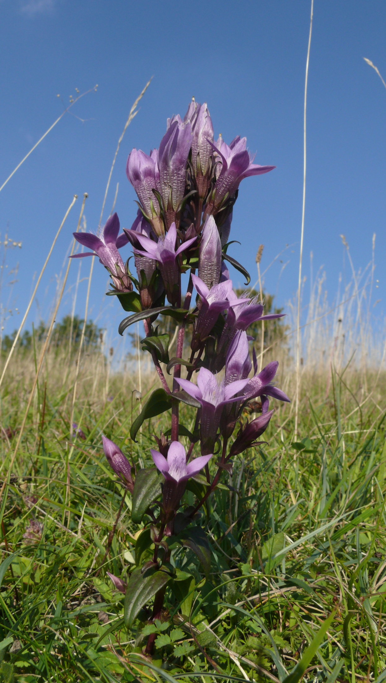 Gentianella germanica, Schwäbisch Alb, Germany